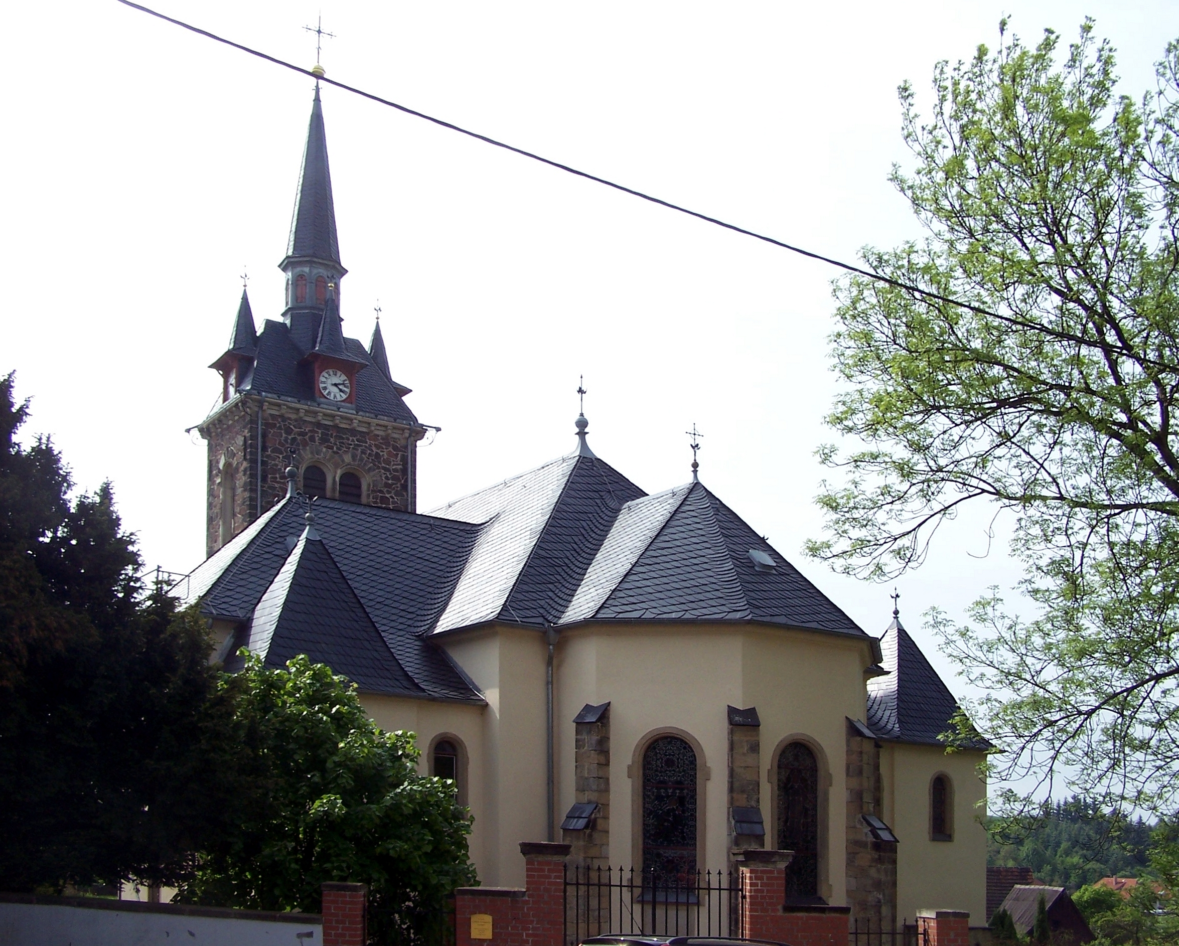 Nikolauskirche in Constappel, Gemeinde Klipphausen, Landkreis Meißen